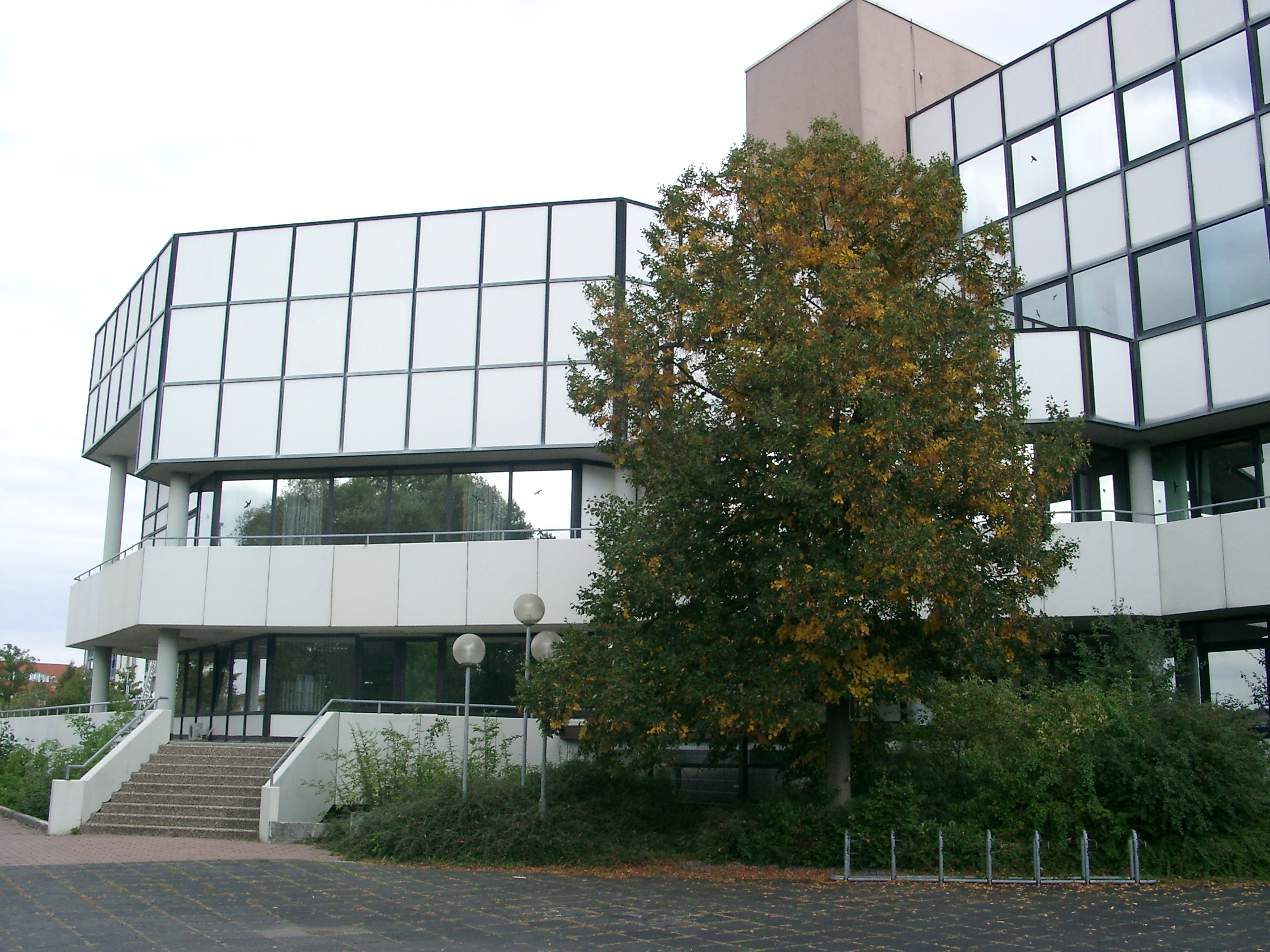 Dietzenbach, Rathaus